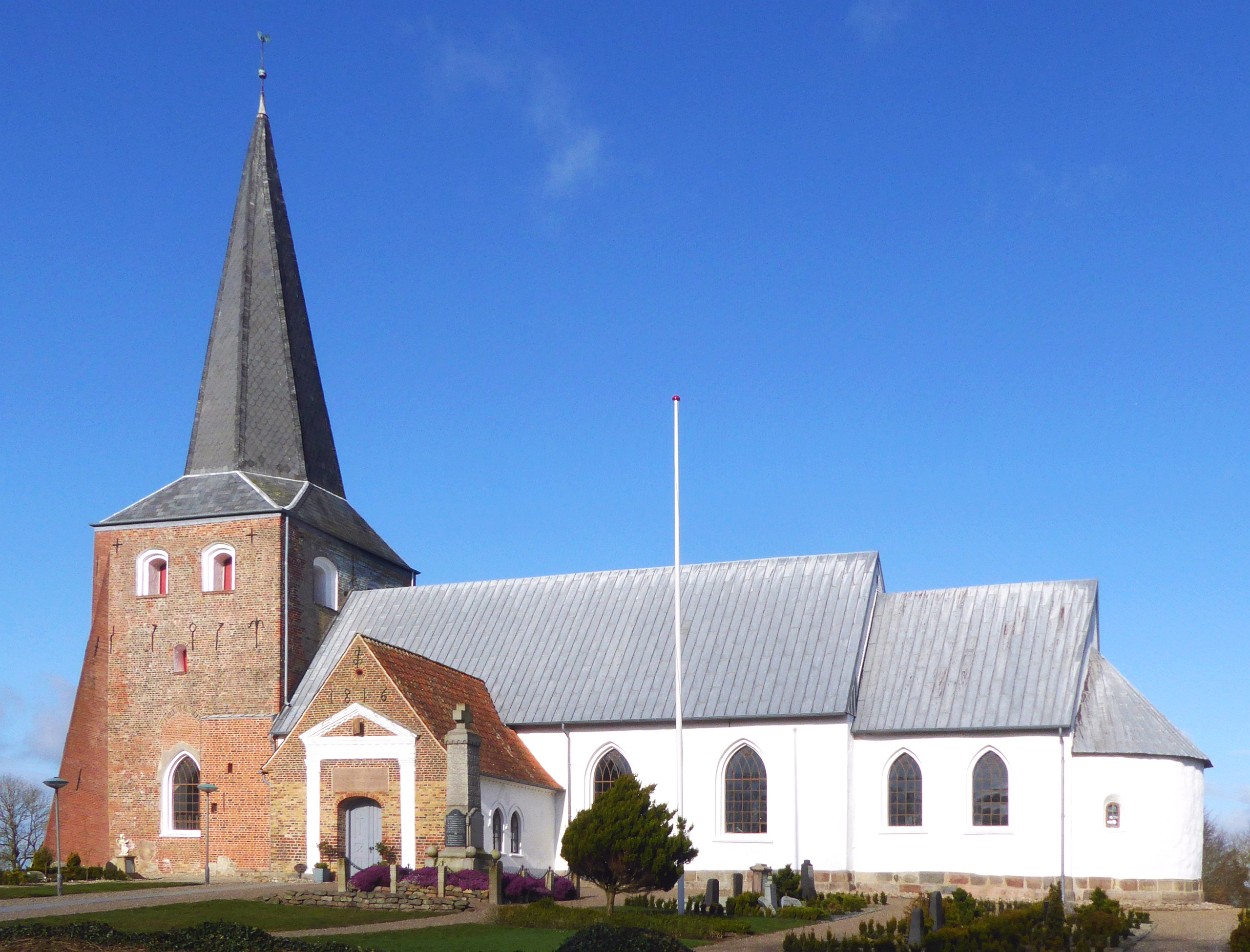 Bjolderup kirke aus dem 12. Jahrhundert - massives Mauerwerk mit schrägen gemauerten Turmstützen - Bjolderup Sogn - Syddanmark - Foto Wolfgang Pehlemann P1350989